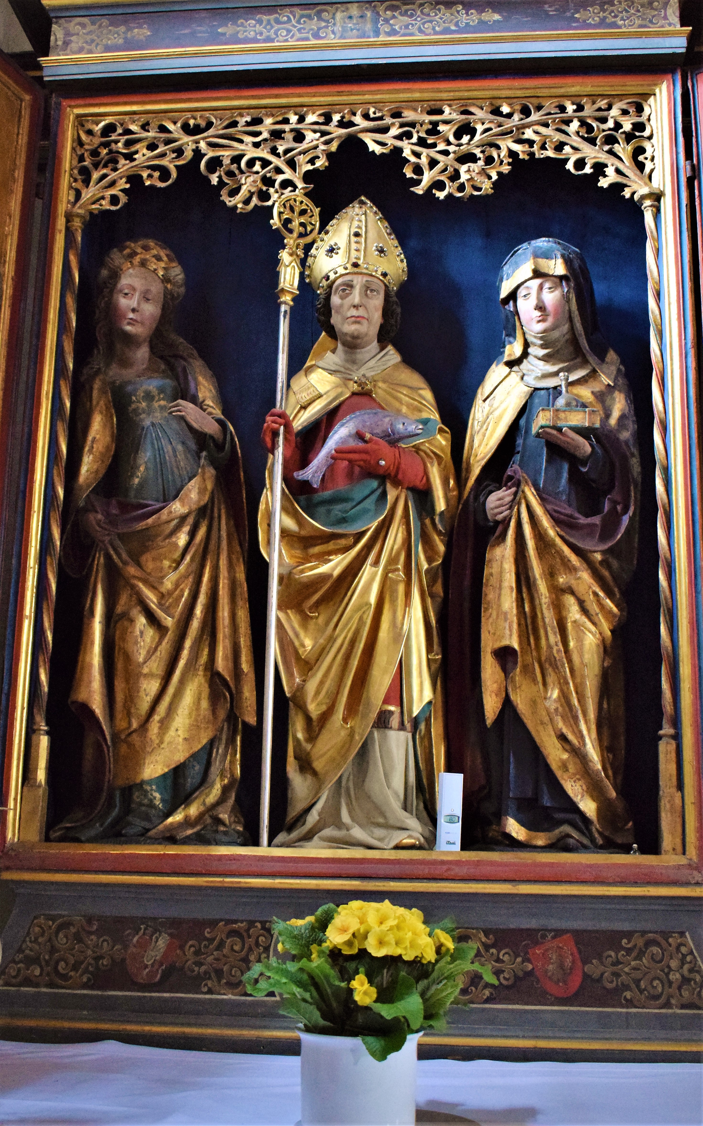 Rieterkirche Kalbensteinberg, Nördlicher Seitenaltar, Mittelschrein: die Heiligen Ursula, Ulrich, Walburga (Ende 15. Jh.)